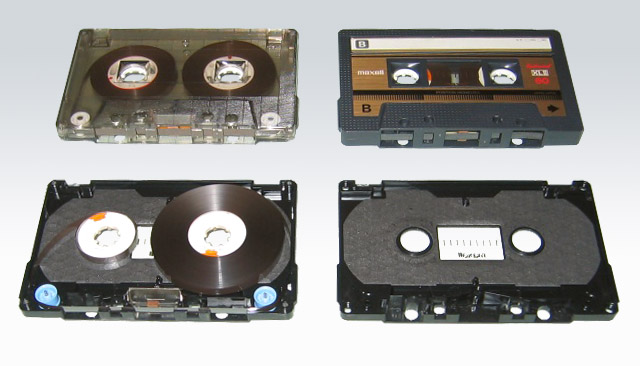 Bildbeschreibung: Compact Cassette Quelle: selbst fotografiert Fotograf/Zeichner: Benutzer:Priwo Datum: Jun 2004 andere Versionen: Weiterbearbeitet von Phrood